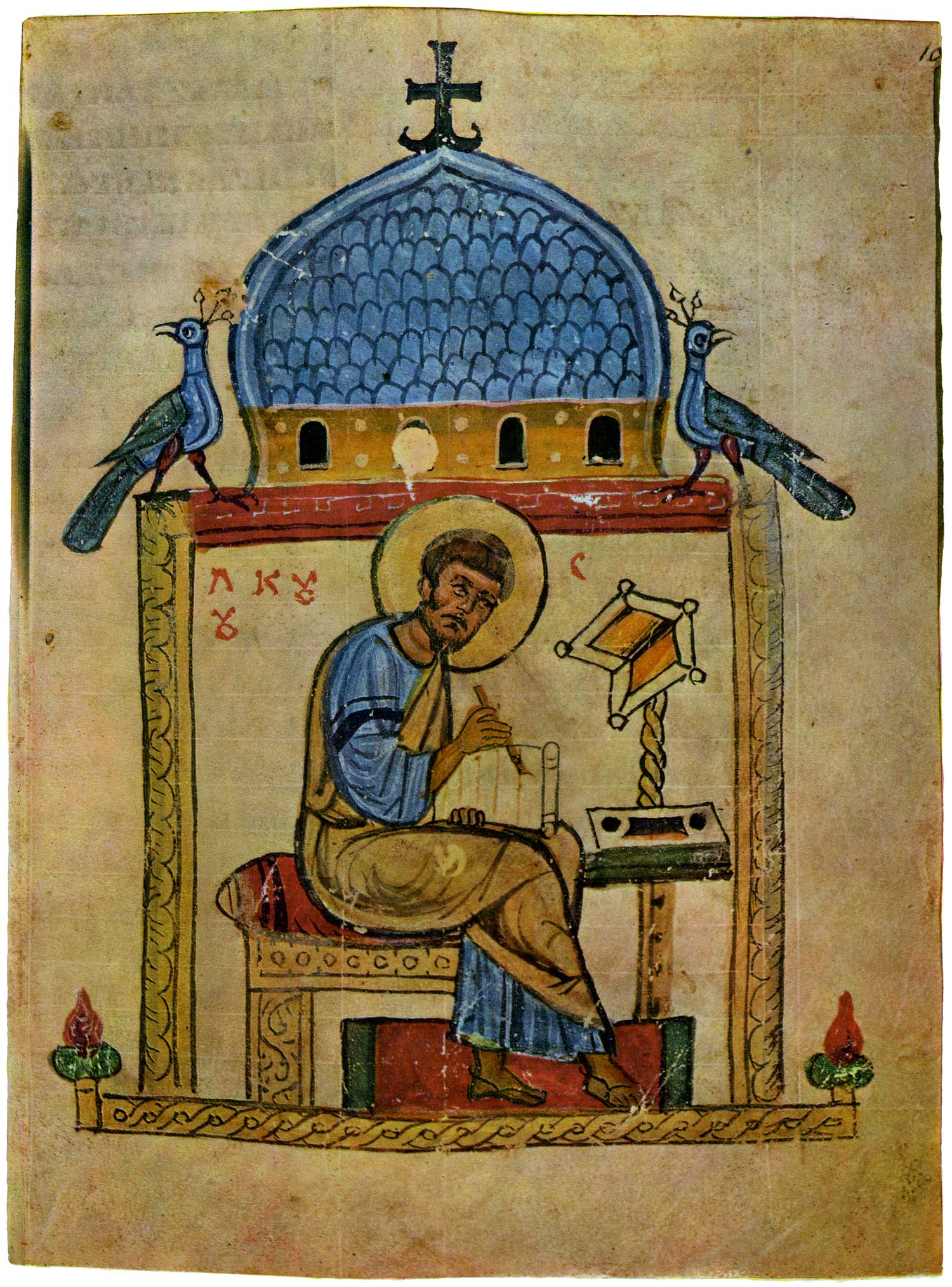 "Евангелист Лука" - миниатюра Добрилова Евангелия